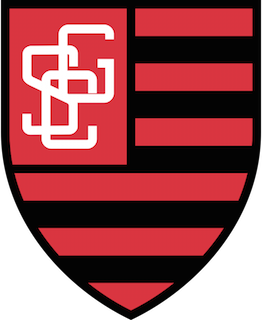 Guarany-CE